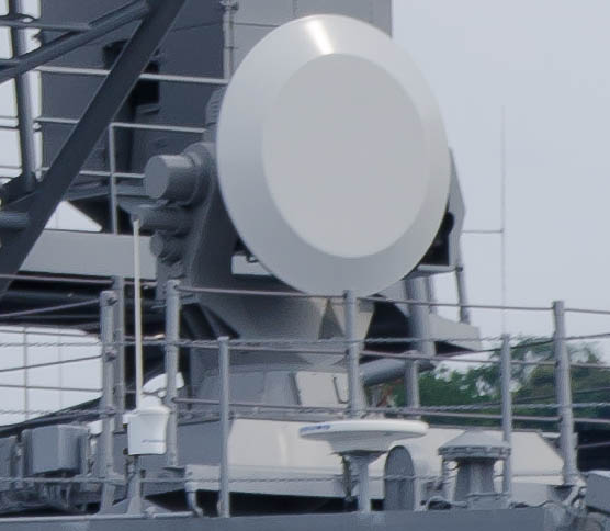 護衛艦「ありあけ」（JS Ariake, DD-109）搭載のFCS-2-31の方位盤。